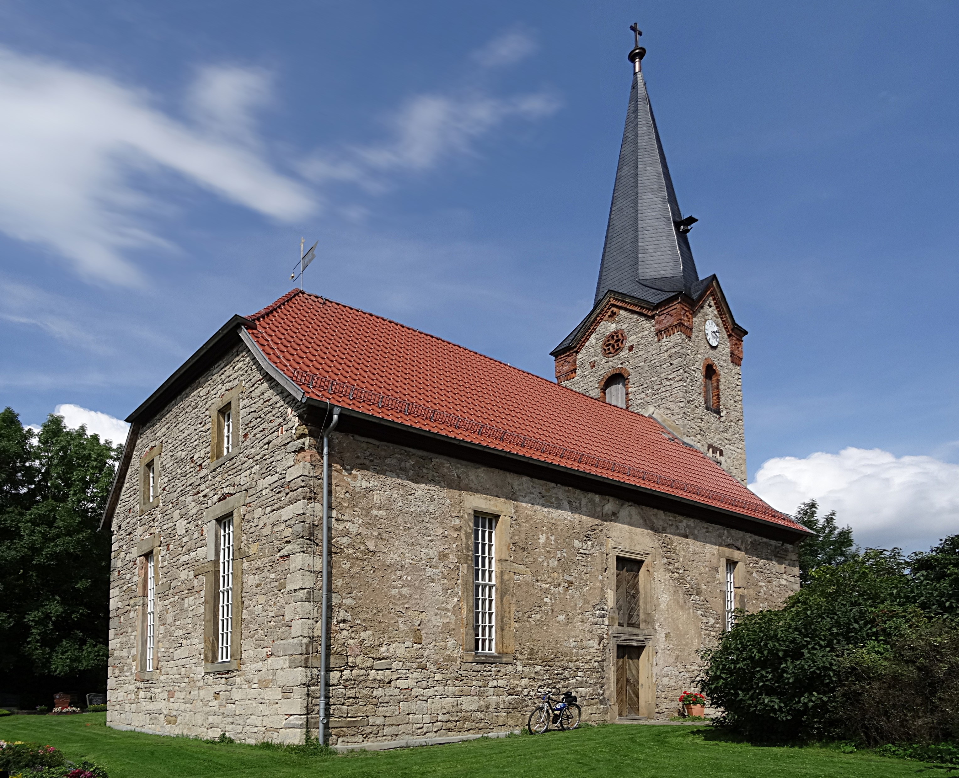 Bechstedt-Wagd Dorfkirche St. Trinitatis